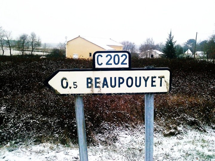 Panneau: Beaupouyet